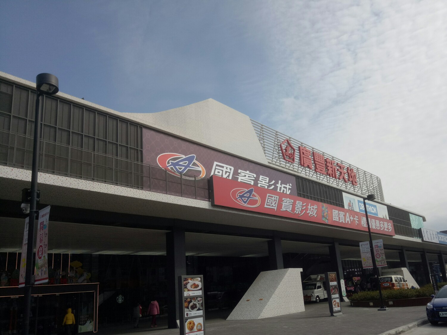 廣豐新天地（KWONG FONG PLAZA）是一位於桃園市八德區的購物中心，於2016年12月22日試營運，2017年1月12日正式開幕。